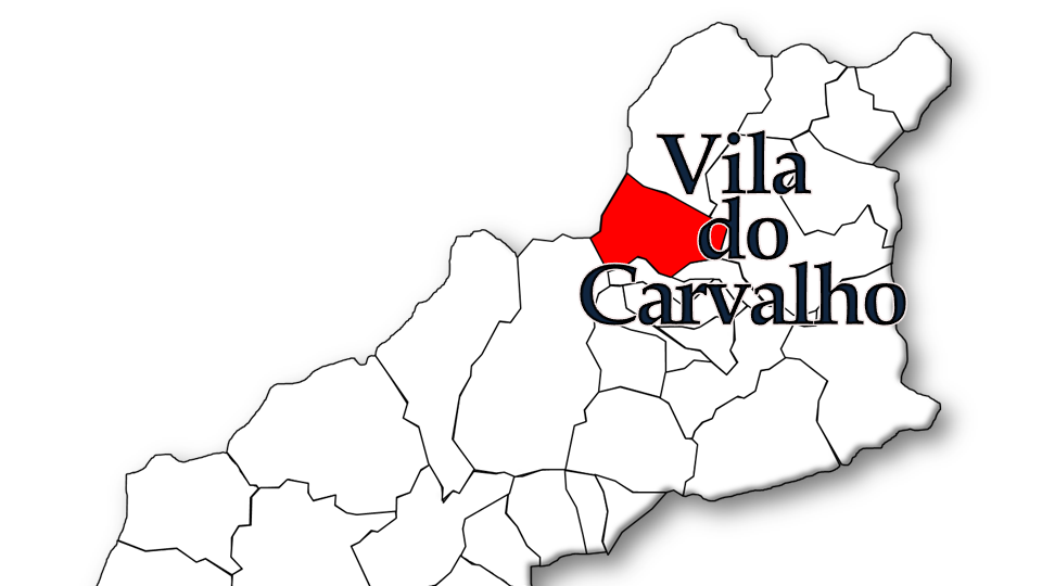 População